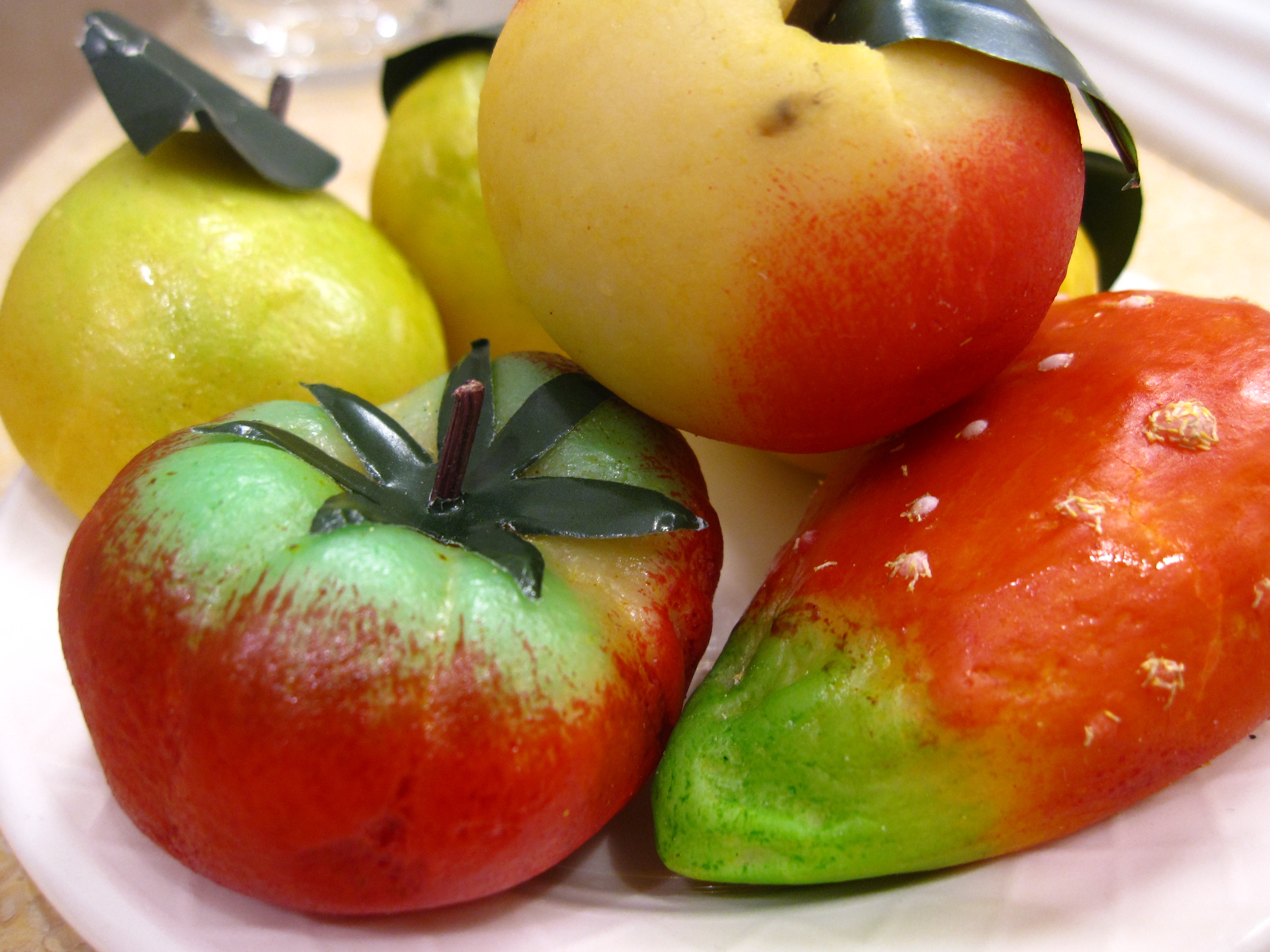 Marzipan